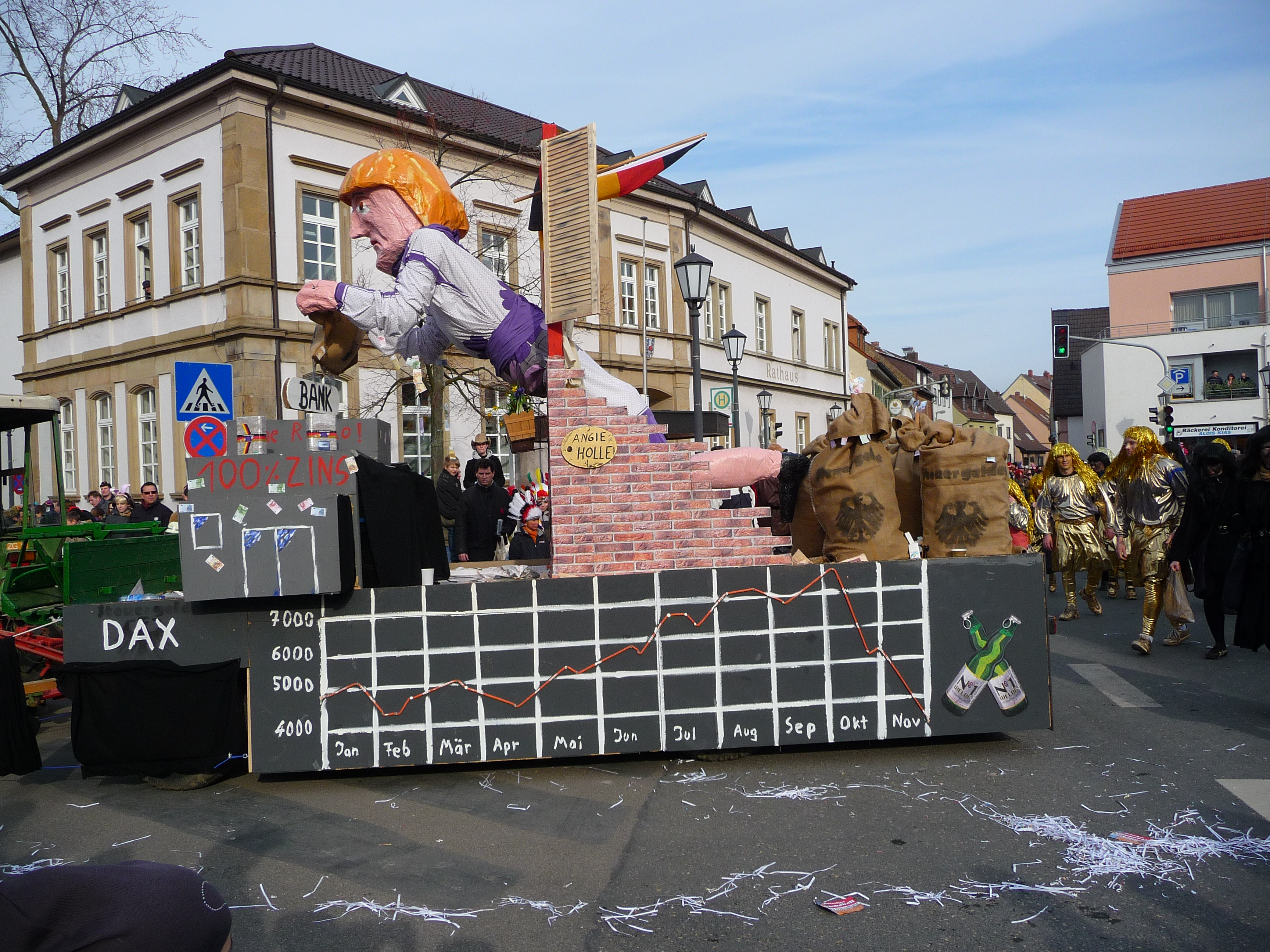 Motivwagen der Landjugend Schwetzingen beim Backenbläserumzug am 15.02.2009 in Plankstadt ("Es war einmal ... Goldmarie und Pechmarie in des Bankenchefs Märchenland")